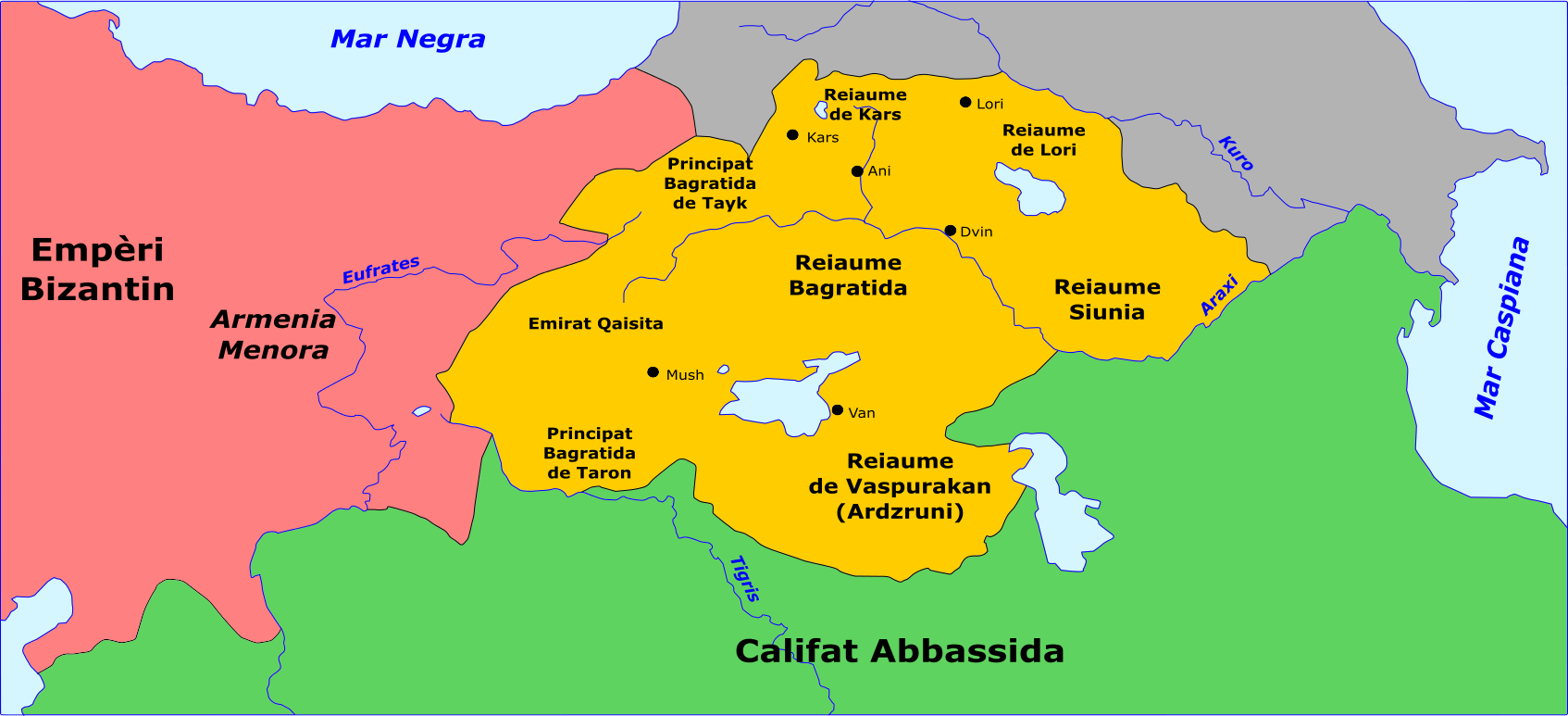 Armenia entre lei sègles IX e XI.